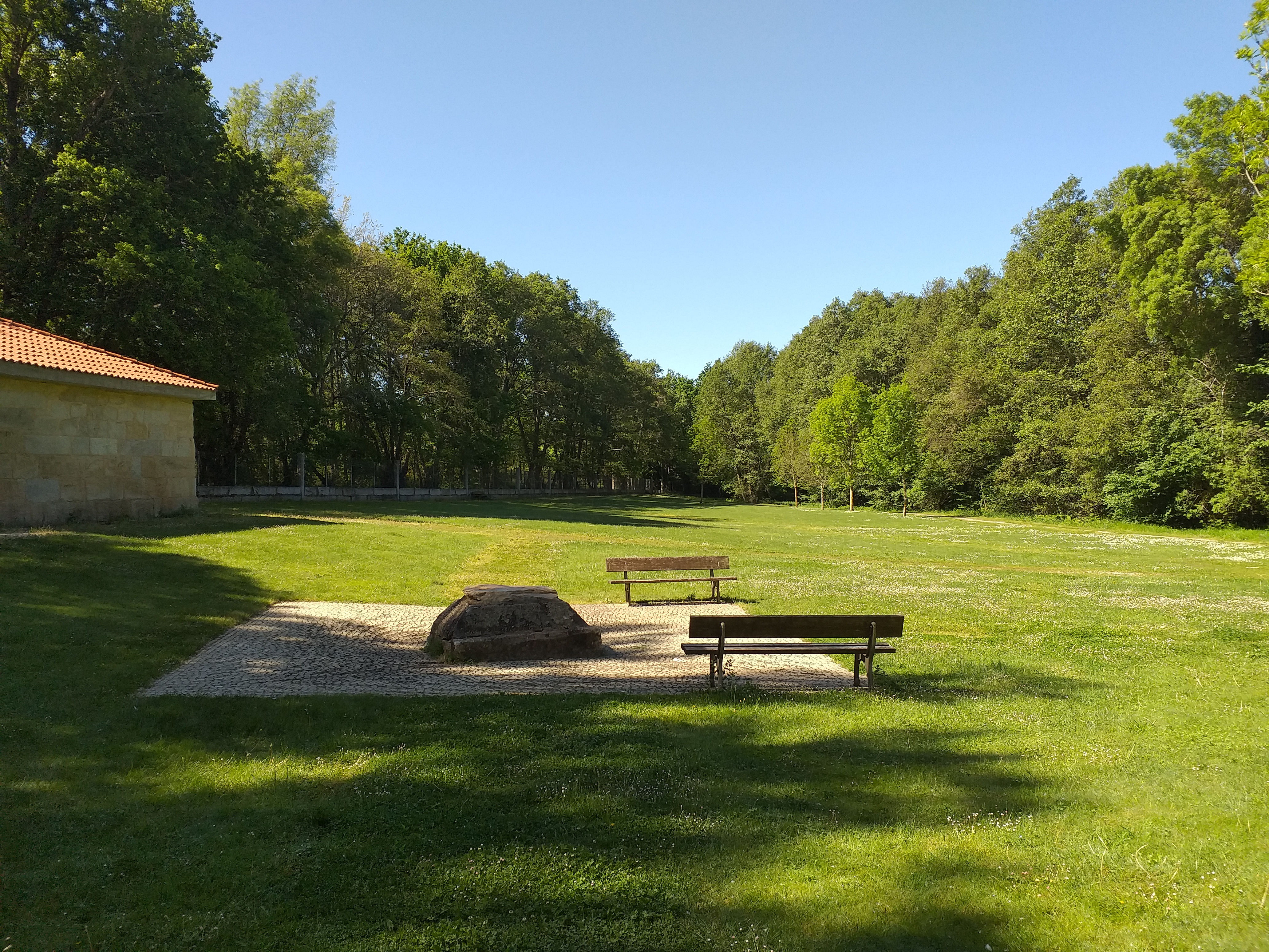 Prado da Fonte do Sapo